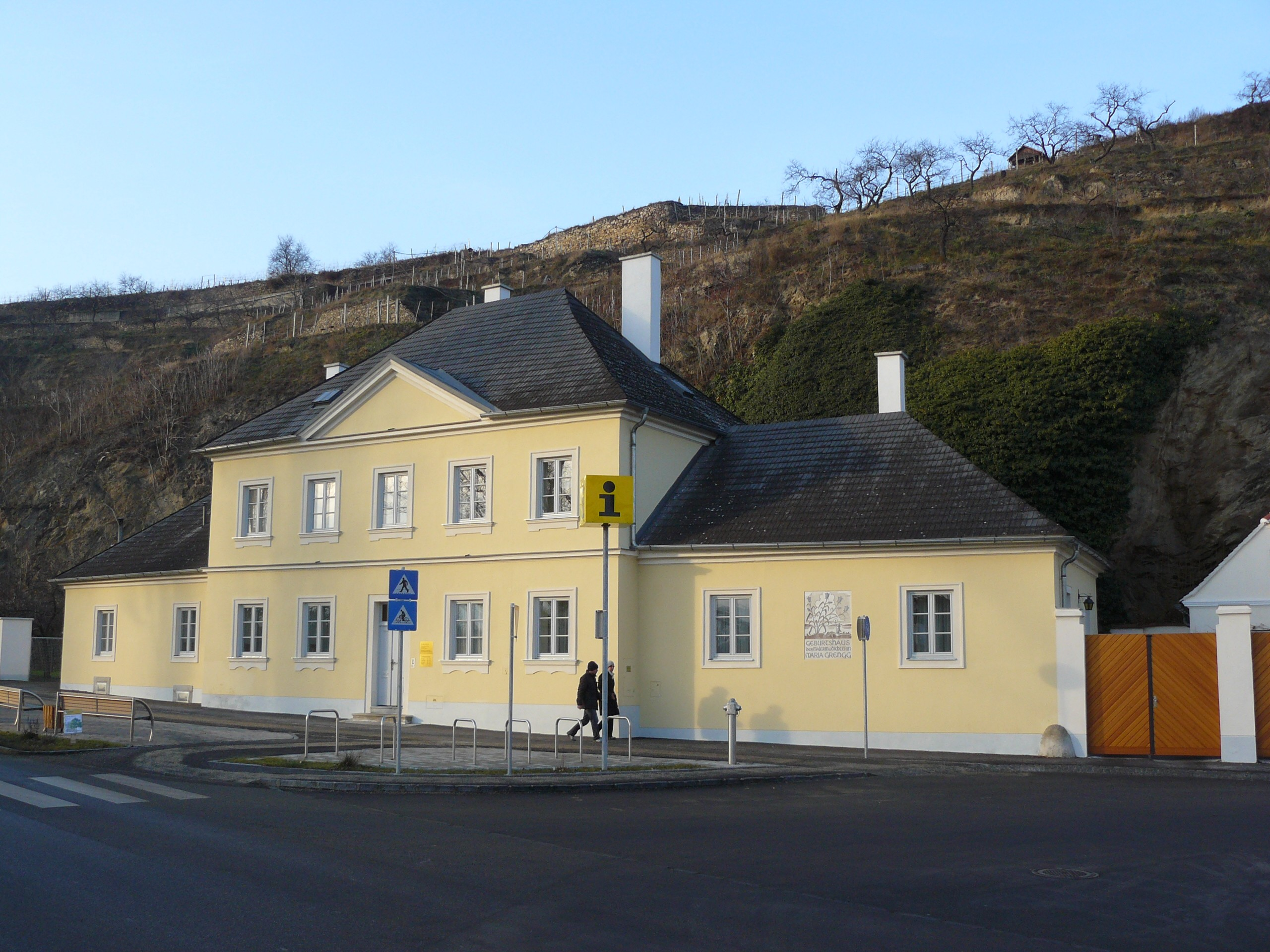 ehem. Brückenmeisterhaus